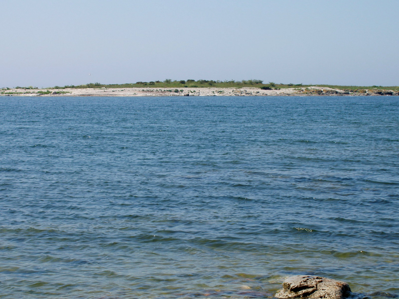 Alumine Vaika saar pildistatuna Vilsandilt.